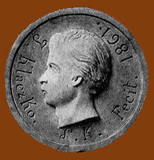 Julian Klaczko, 1861. Medalion.